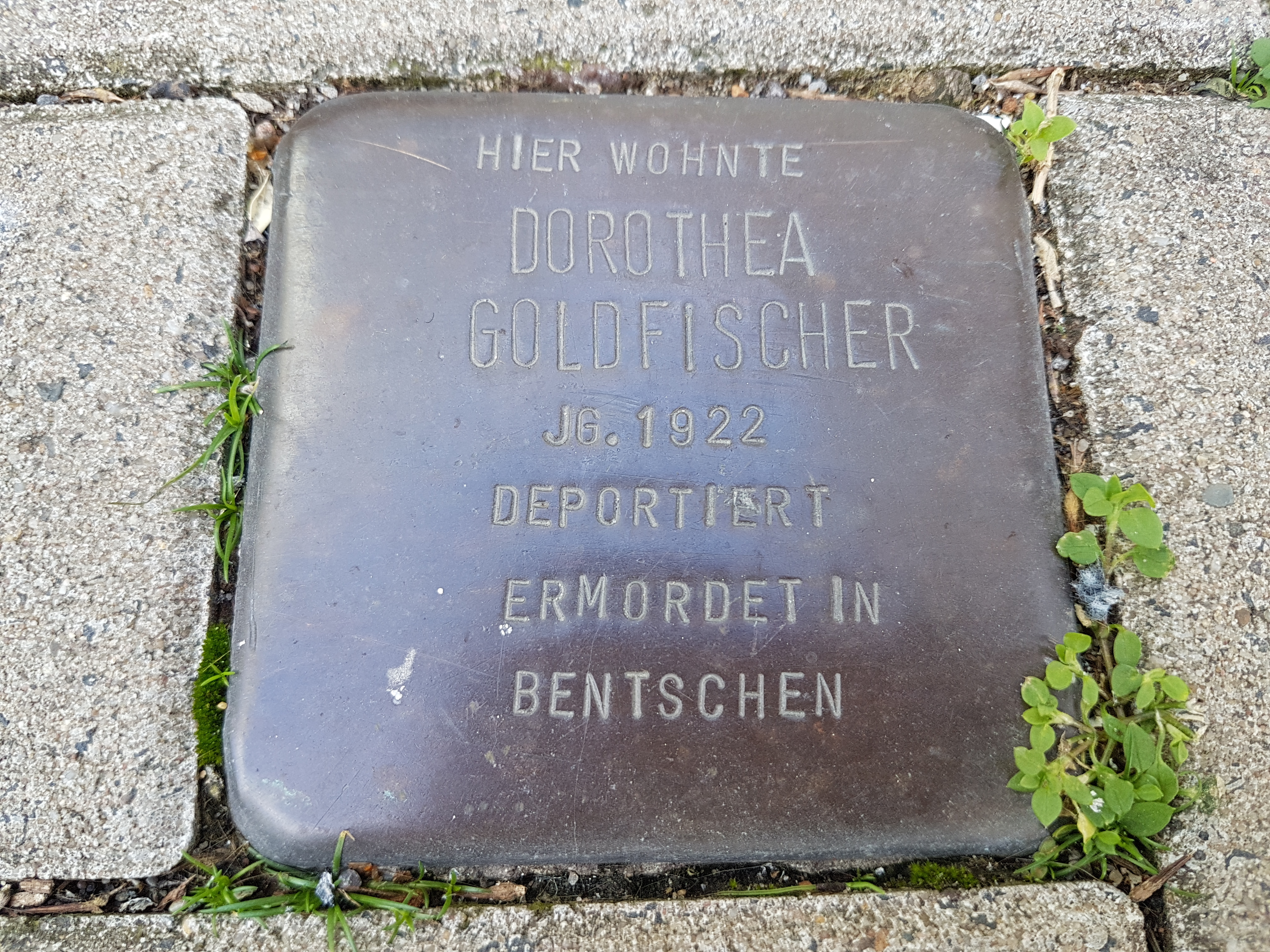 Stolperstein Duisburg Dorothea Goldfischer